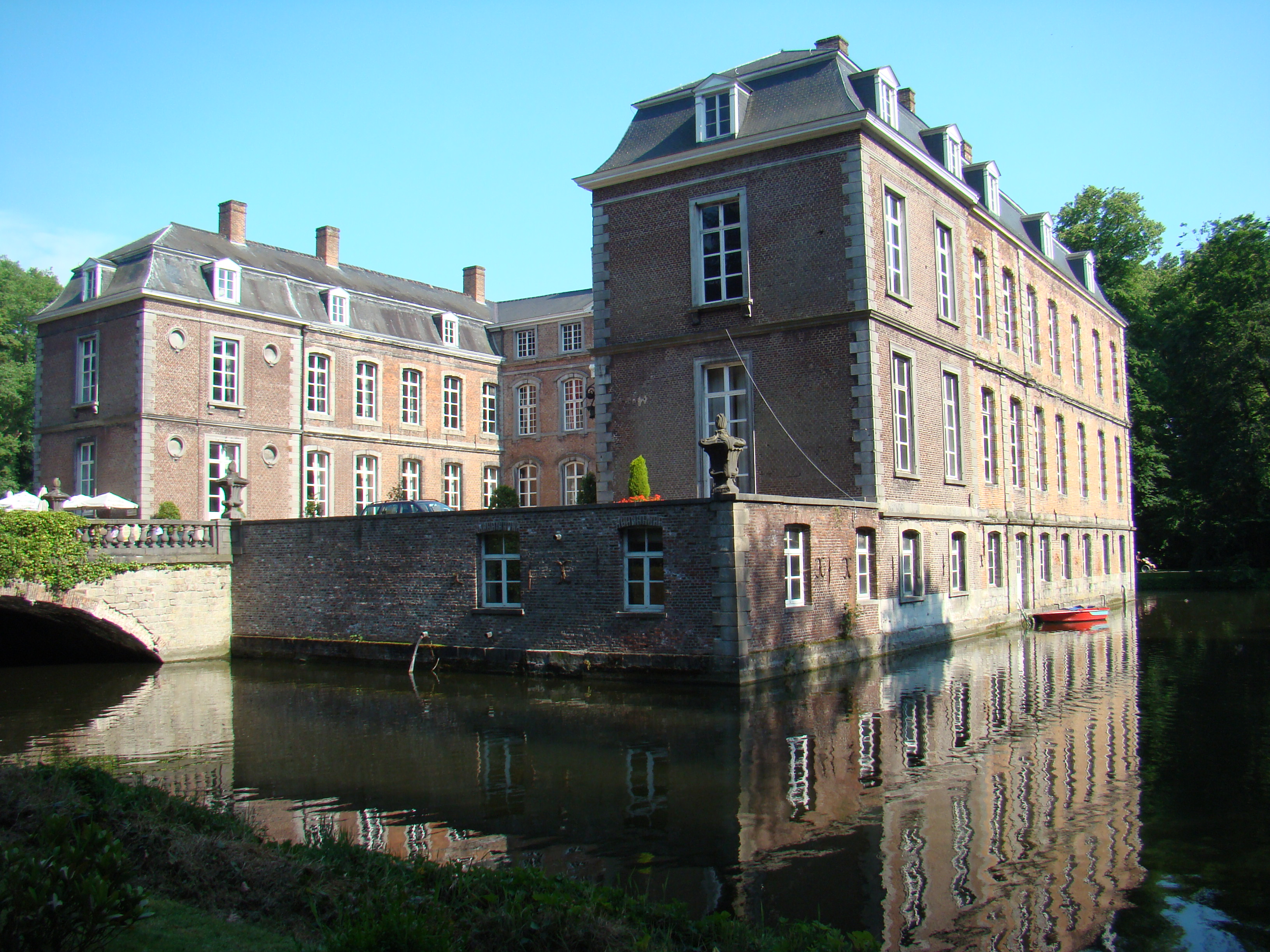 Kasteel naast de markt van Ingelmunster Castle next the market of Ingelmunster, West Flanders, Belgium